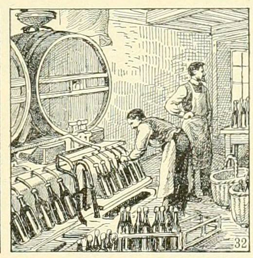 Tirage en bouteilles popur la prise de mousse (Champagne)